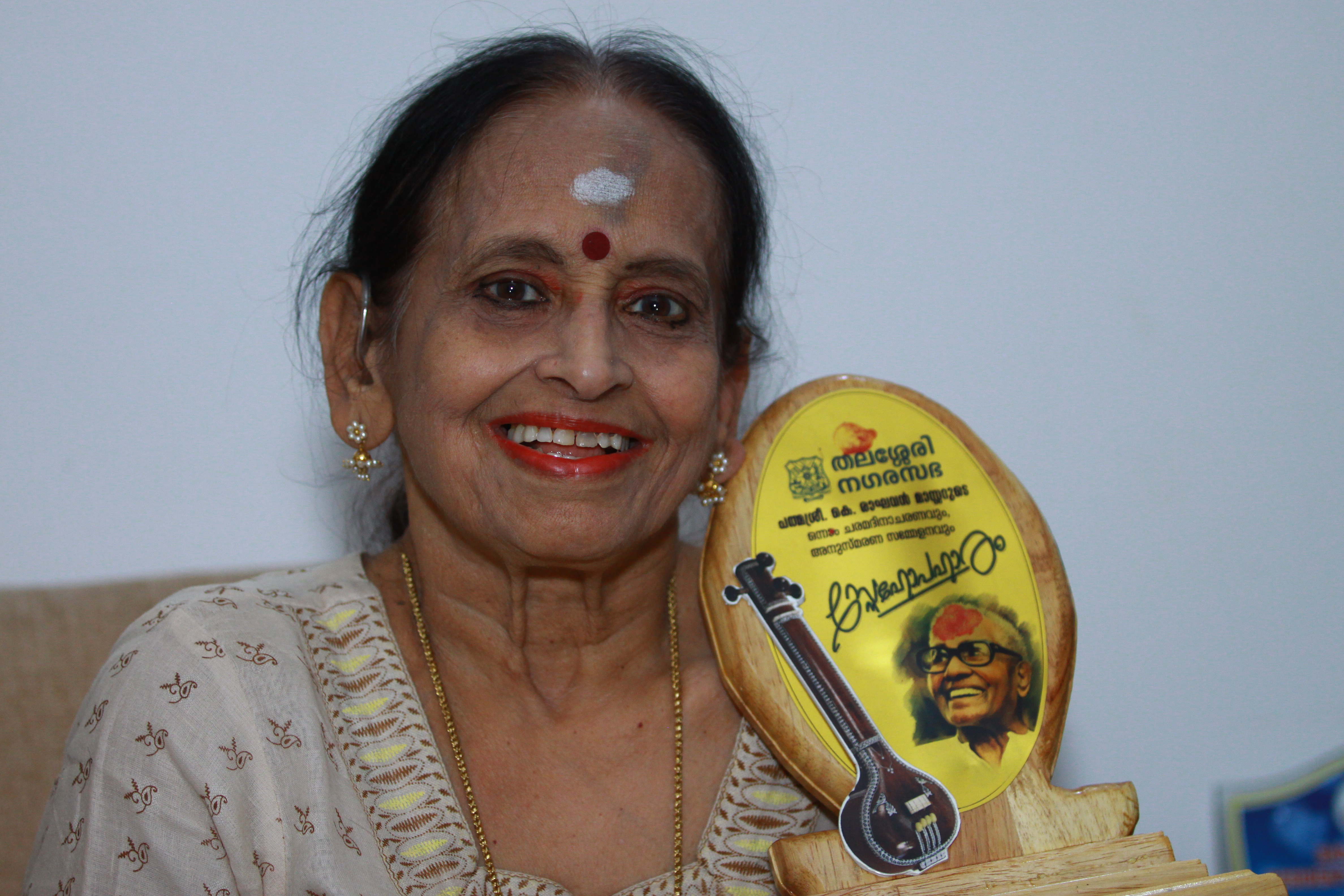 പി.മാധുരി കെ.രാഘവന്‍മാസ്റ്റര്‍ അനുസ്മരണ വേദിയില്‍ - തലശ്ശേരി